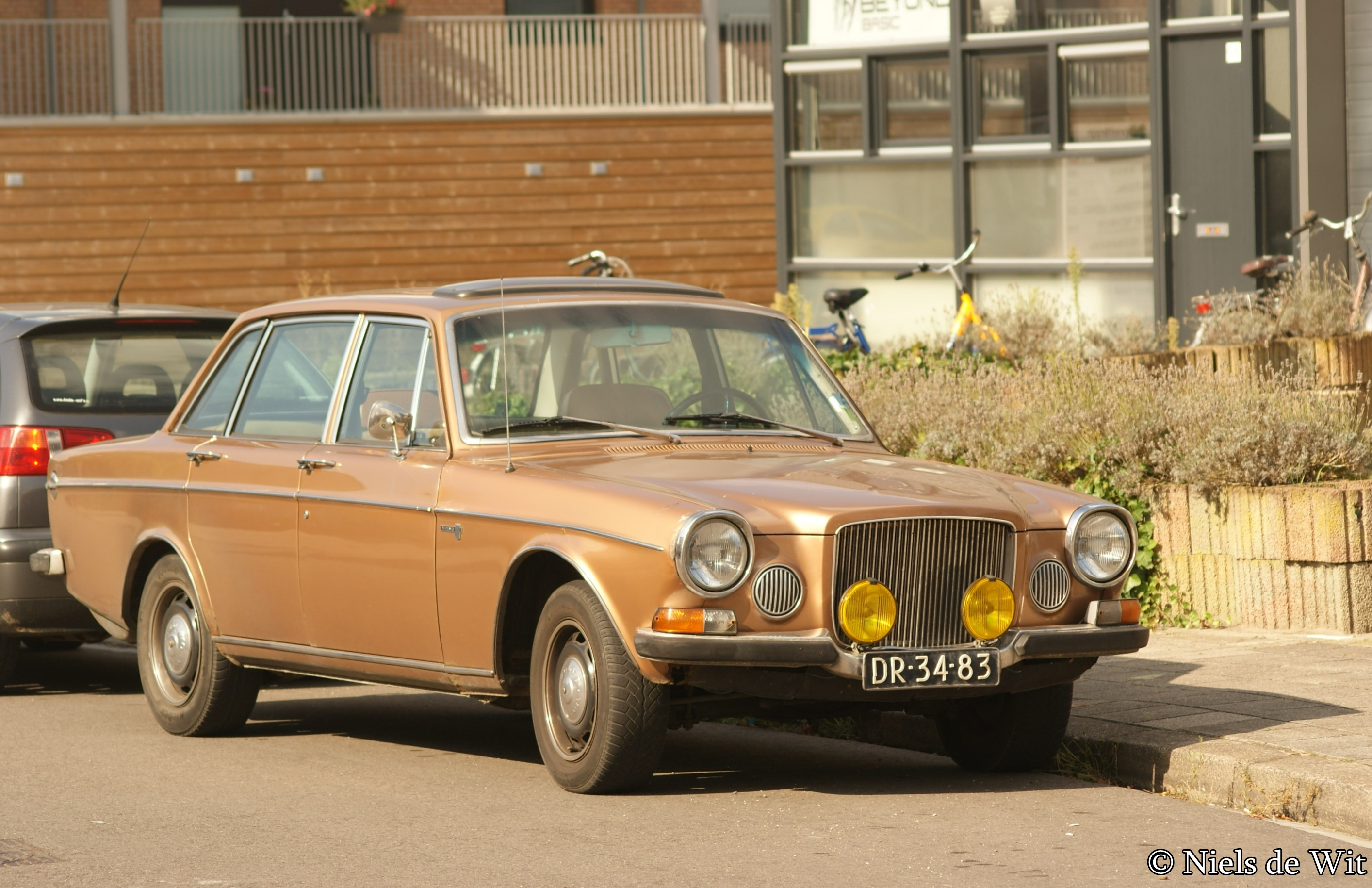 DR-34-83